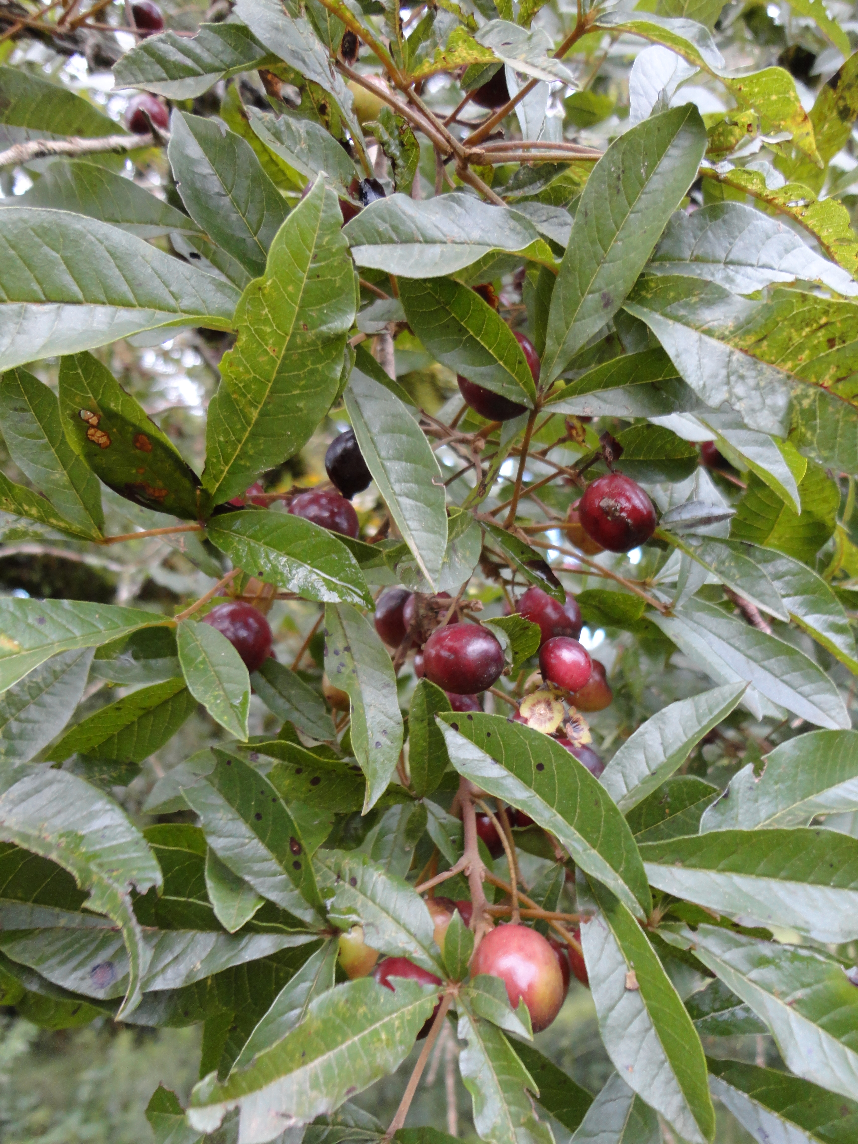 Imagem mostrando as folhas e os frutos do Tarumã.